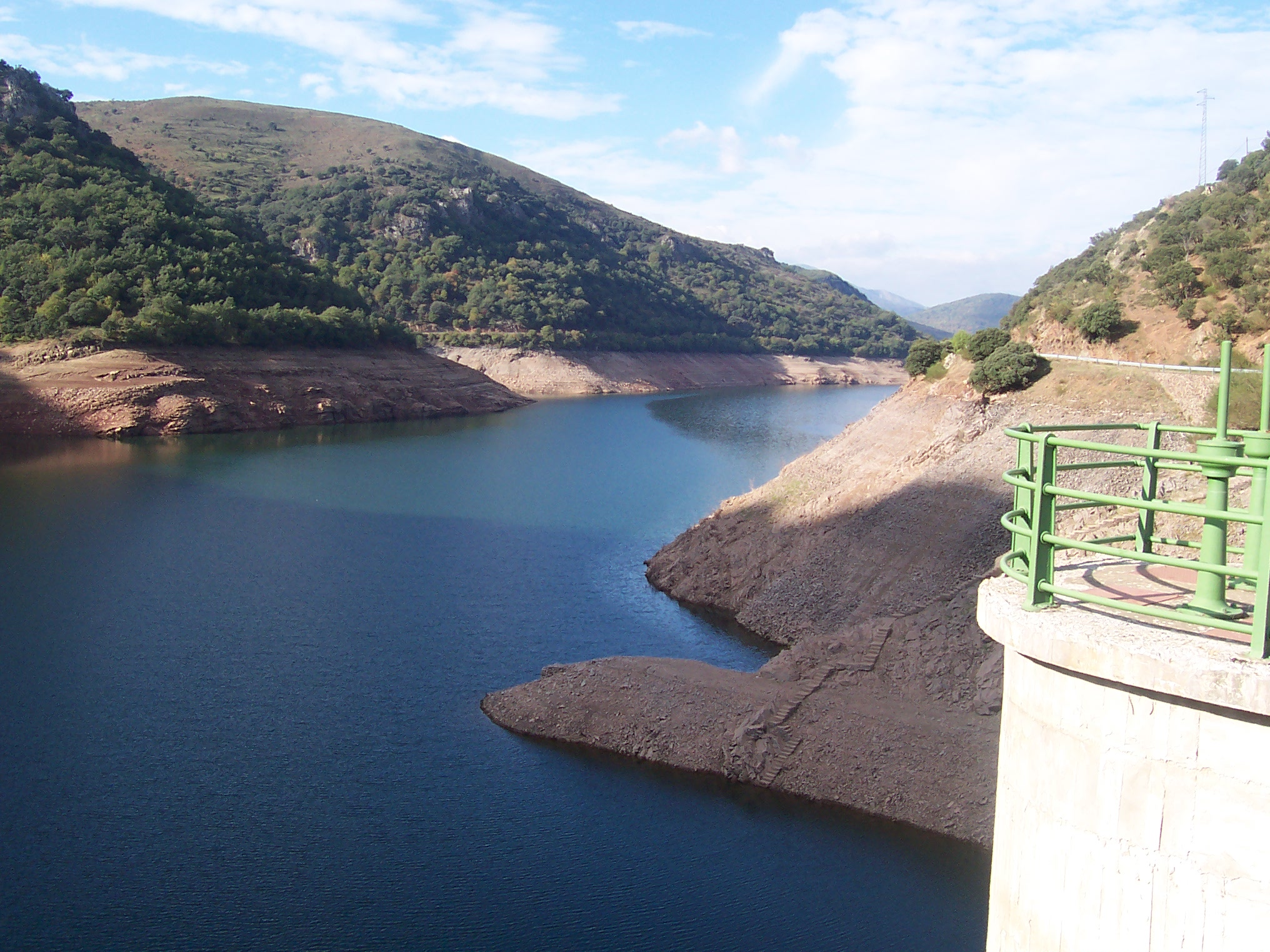 Embalse de Mansilla (La Rioja)